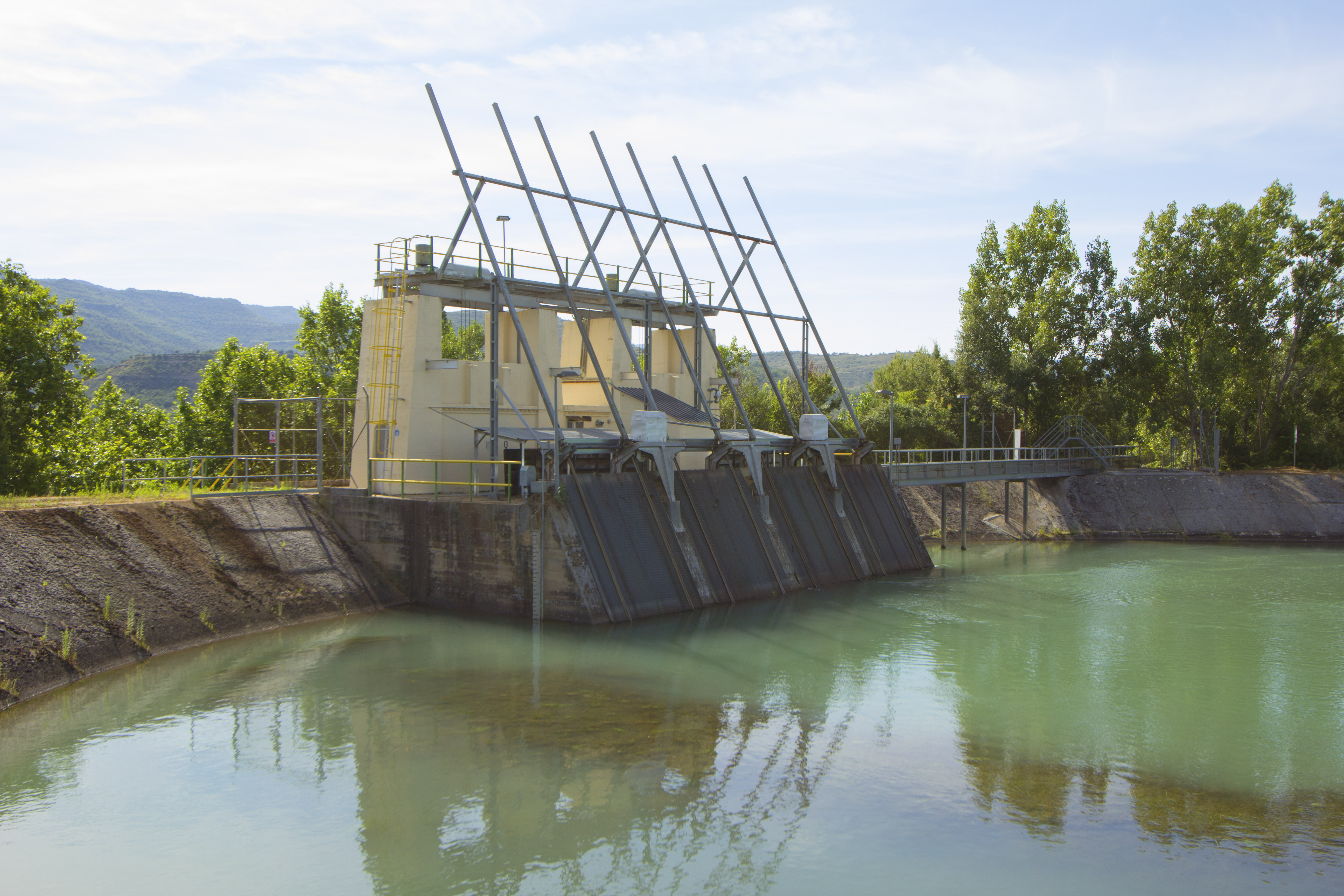 Filtres de la cambra d'aigua de la central hidroelèctrica de Terradets, Gavet de la Conca (Pallars Jussà)